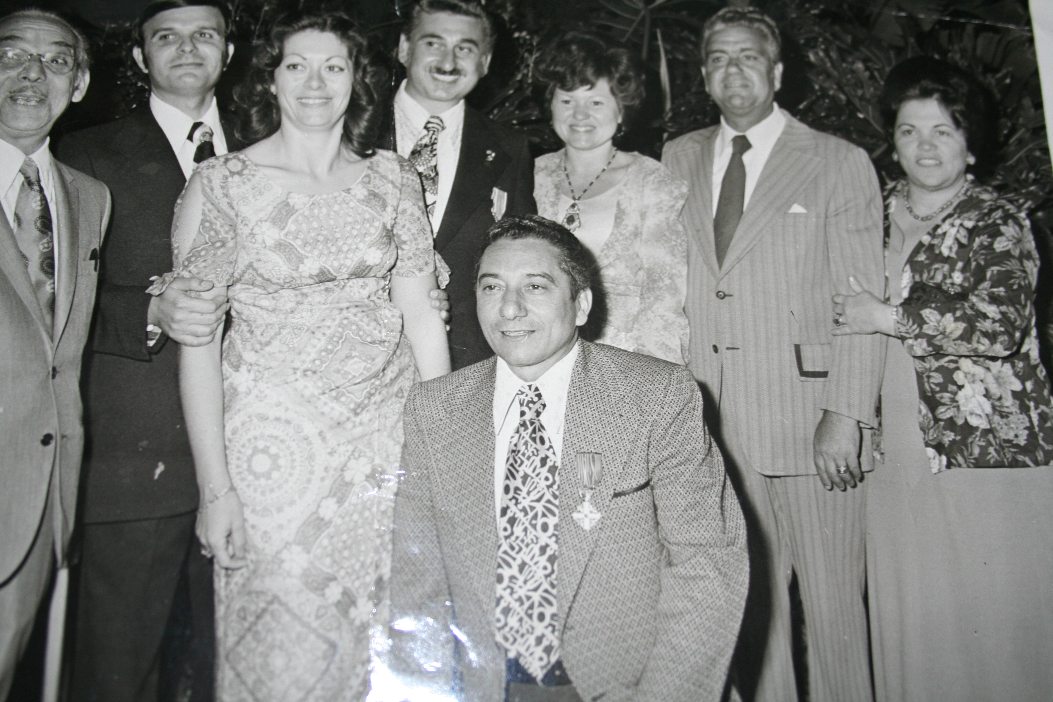 Foto di Gruppo Console Onorario Iannone